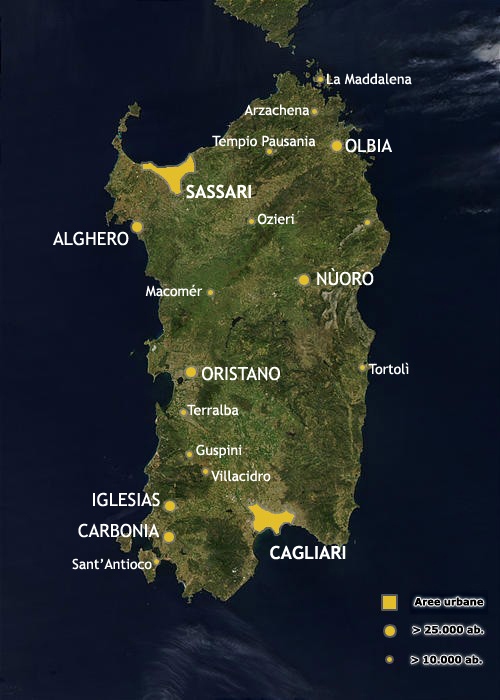 By Felisopus (abusa pure del mio tempo 16px) 15:53, 15 lug 2006 (CEST)